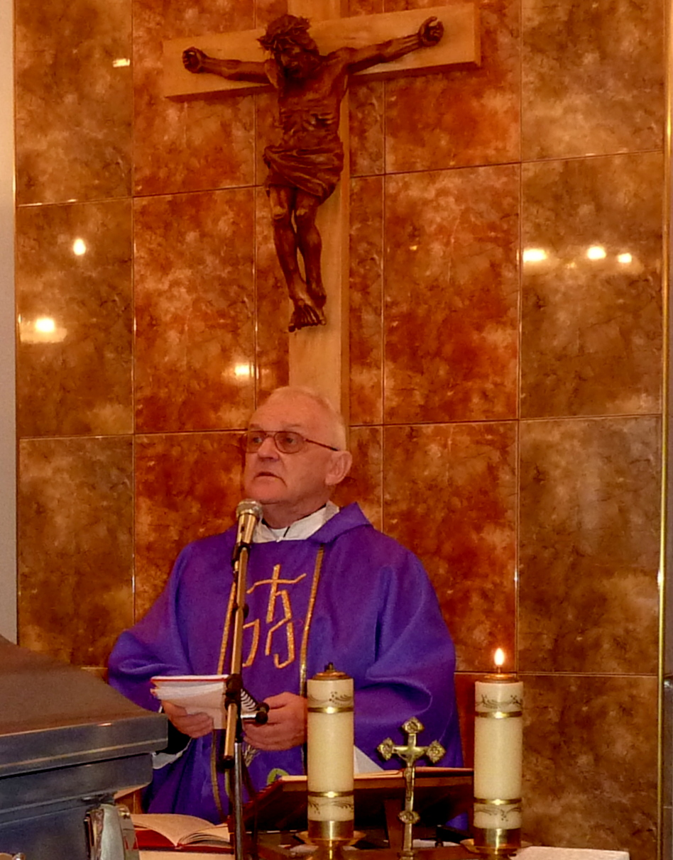 ks. Andrzej Szostek odprawiający mszę św. pogrzebową